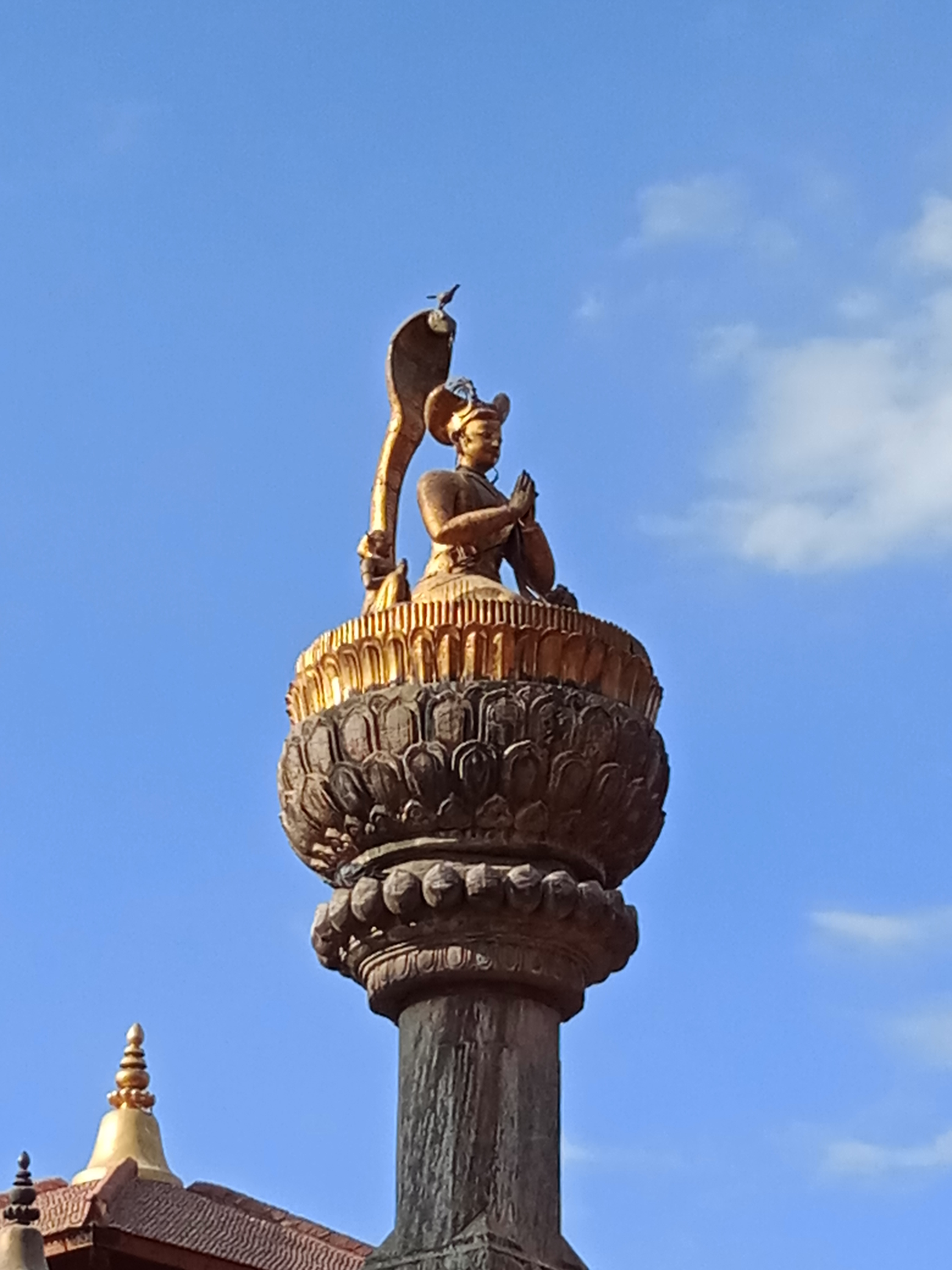 नेपाली: King Yog Narendra Malla Patan Durbar Square